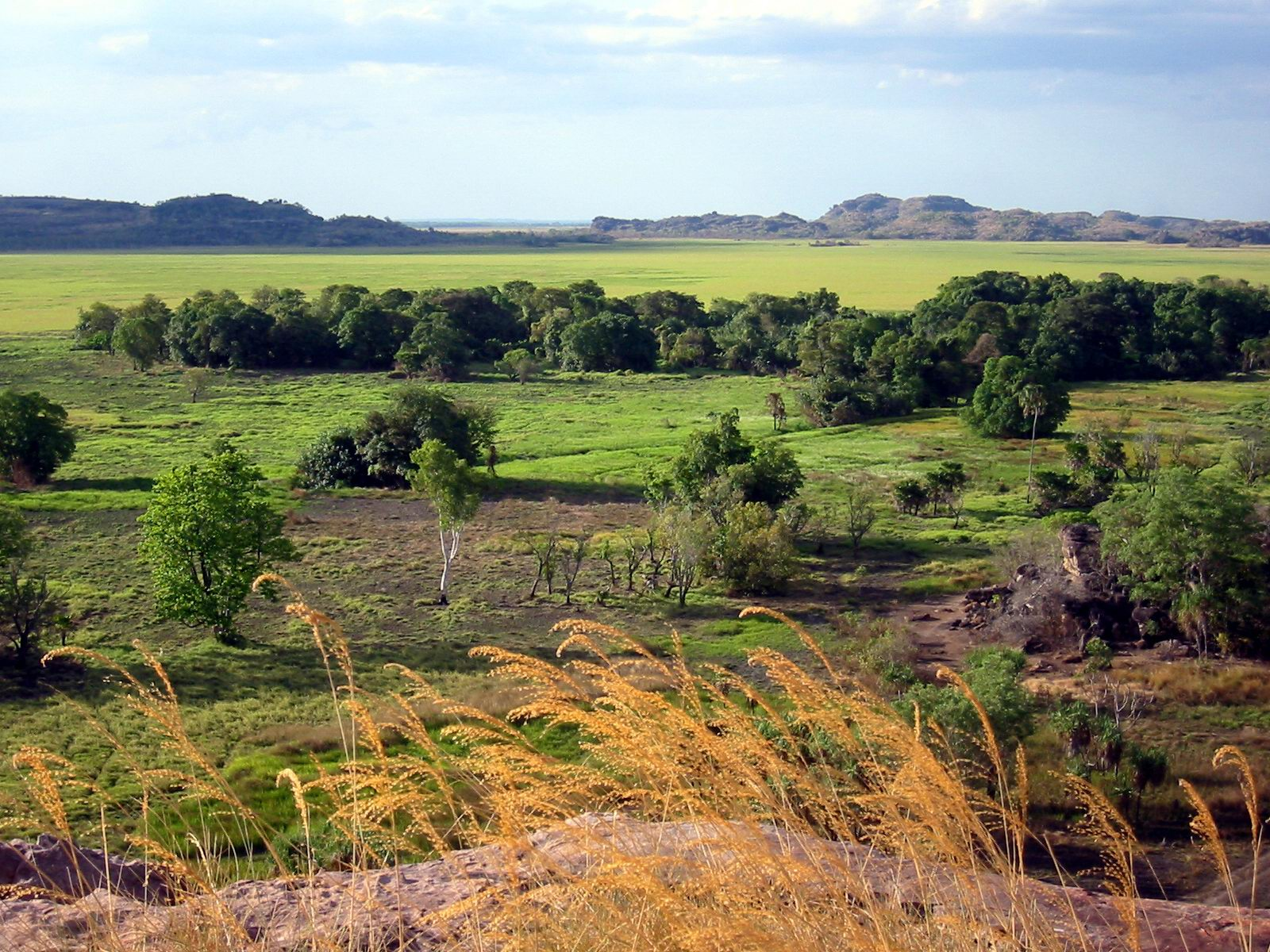 Ubirr, Kakadu National Park, Australia